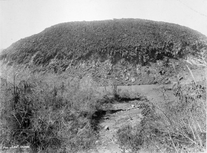 Foto. Vulkaan Galoenggoeng.